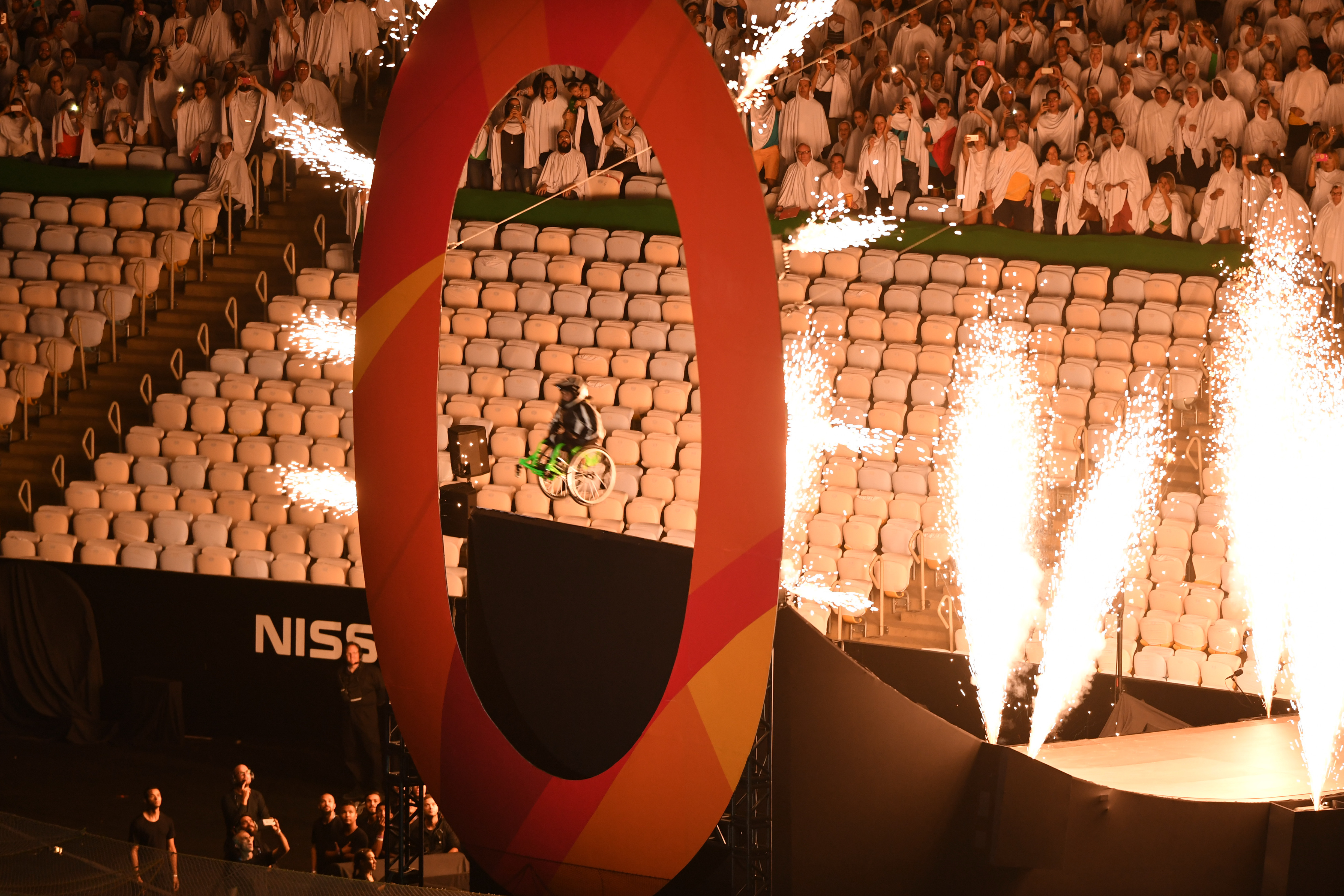 Rio de Janeiro - Cerimônia de abertura dos Jogos Paralímpicos Rio 2016 no Estádio do Maracanã, Aaron Fotheringham.